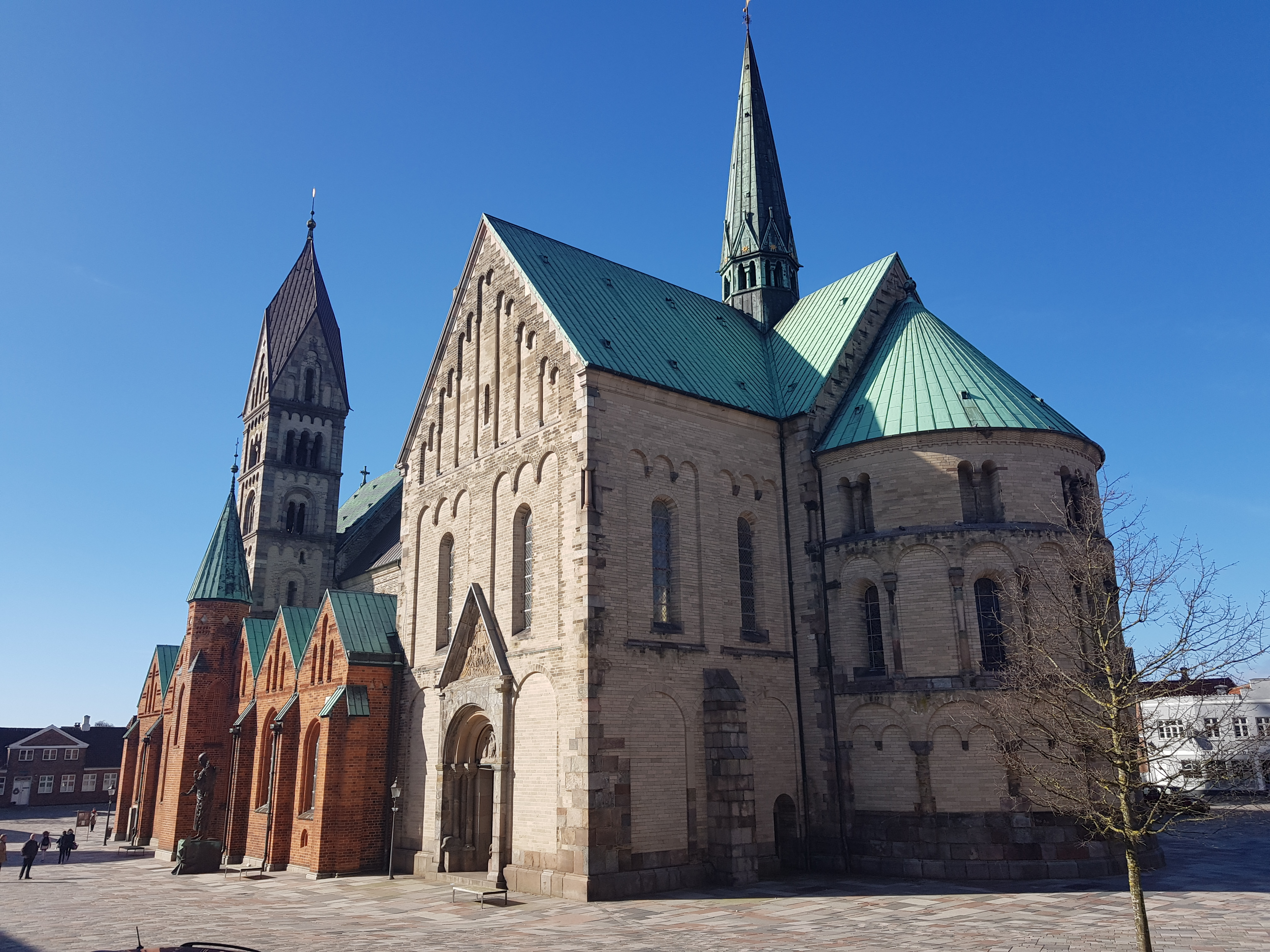 Ribe Domkirke set fra sydøst